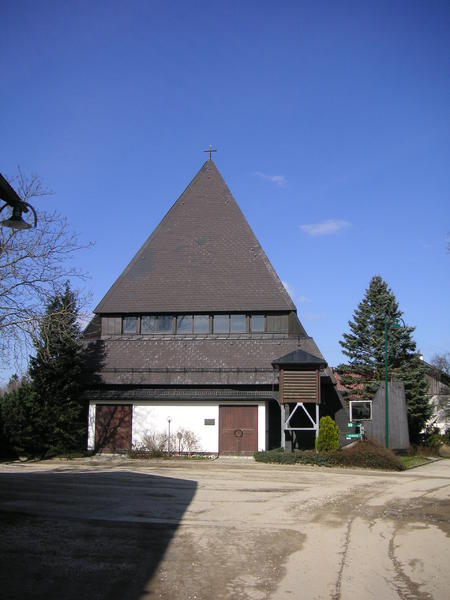 Church in Arnberg